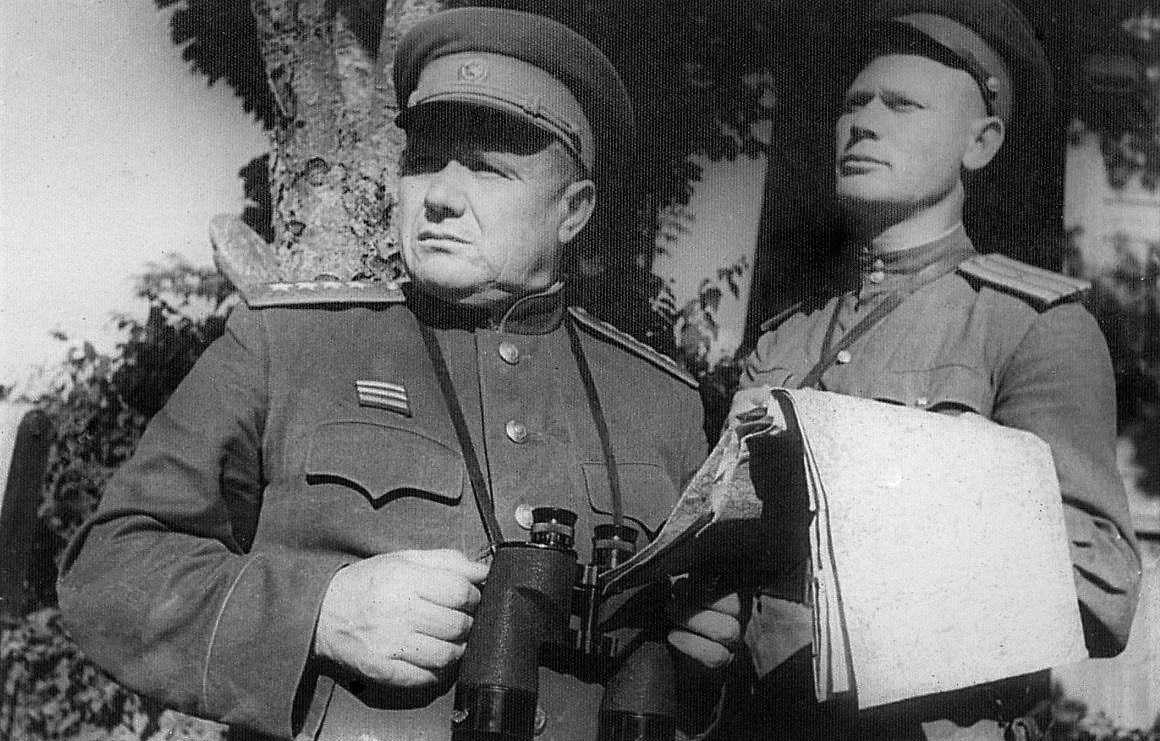 Командующий 2-м Прибалтийским фронтом генерал армии А. И. Ерёменко со своим порученцем майором Ф. Орловым накануне Рижской операции